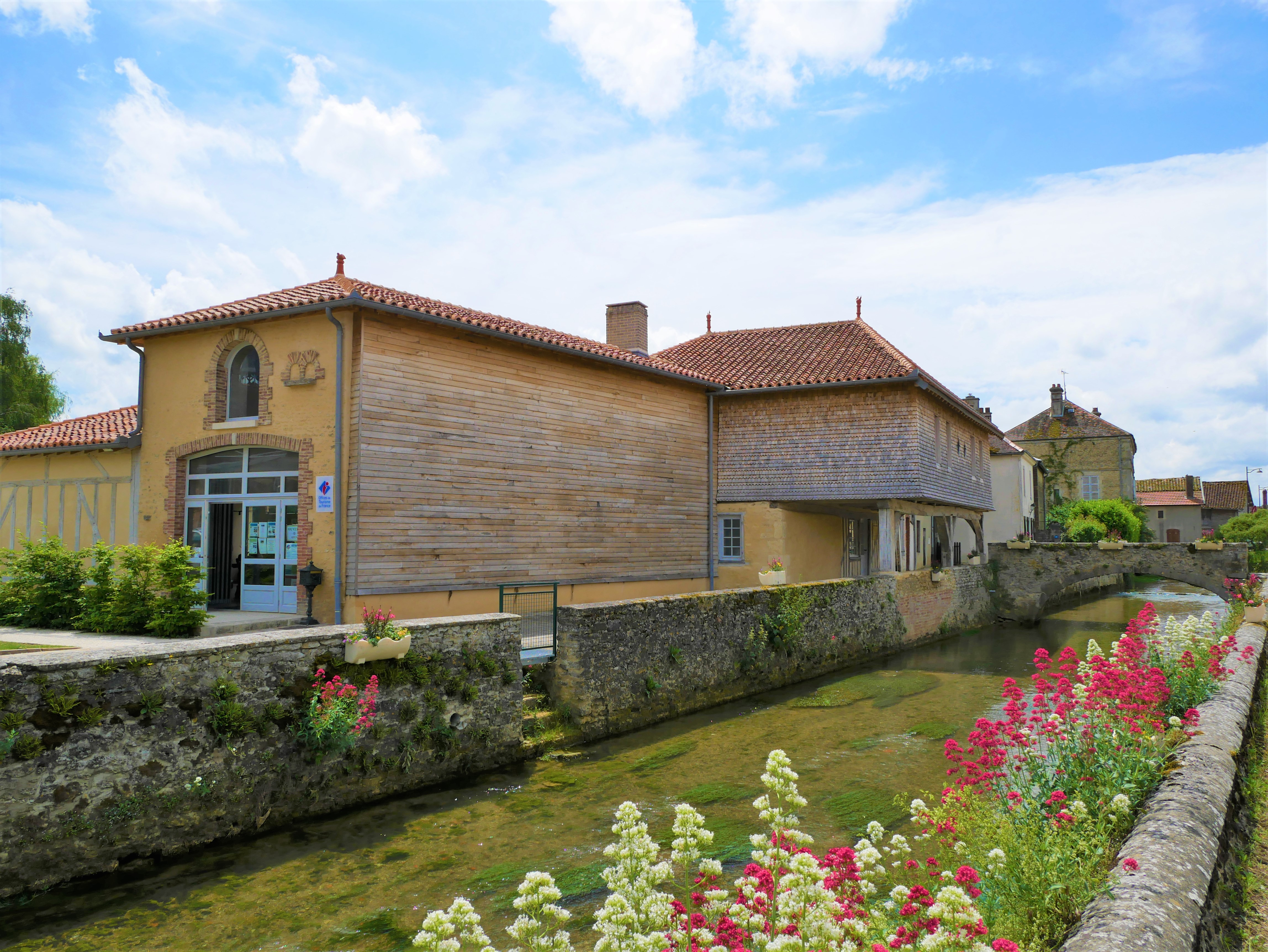 Bureau d'Information Touristique de Soulaines-Dhuys